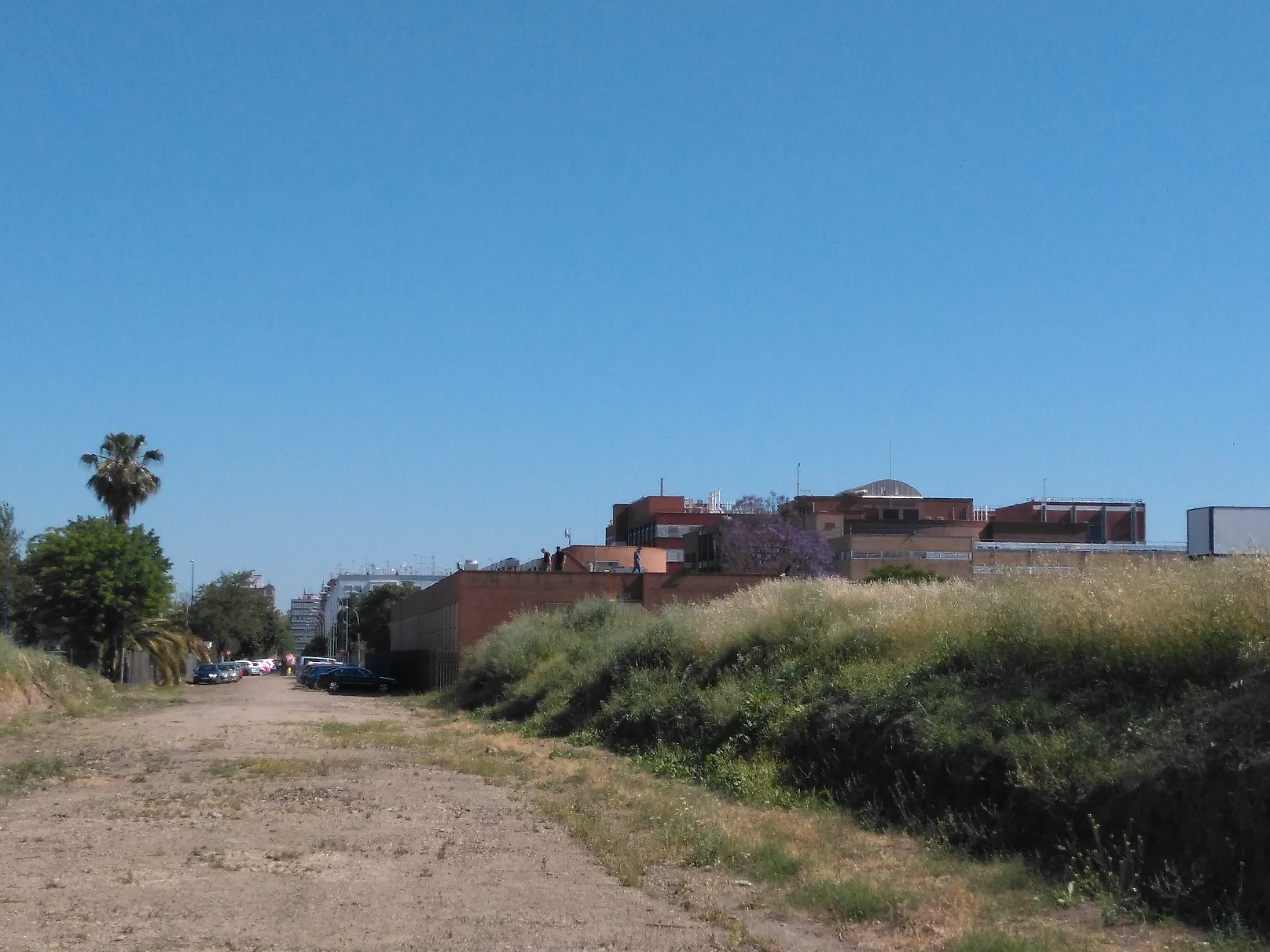 Lateral del Centro Informático Científico de Andalucía (CICA), Sevilla